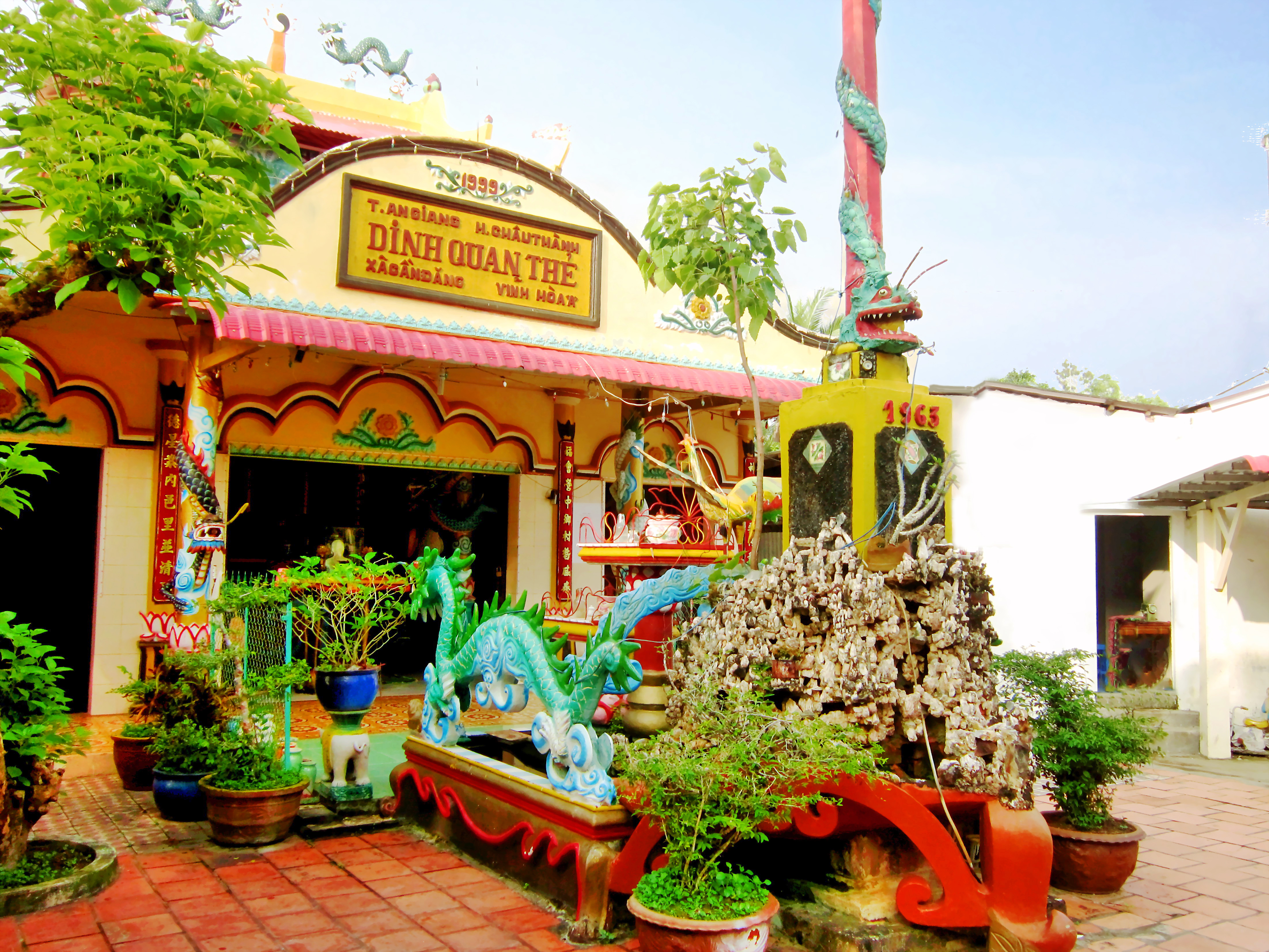 Dinh Quan Thẻ (cây thẻ số 1) ở Cần Đăng; nay thuộc huyện Châu Thành, tỉnh An Giang, Việt Nam. Thẻ được cắm ở vị trí trước bàn thông thiên (phía sau cột cờ), tuy nhiên do thời gian, thẻ đã bị đất bồi lấp nên không còn nhìn thấy được.